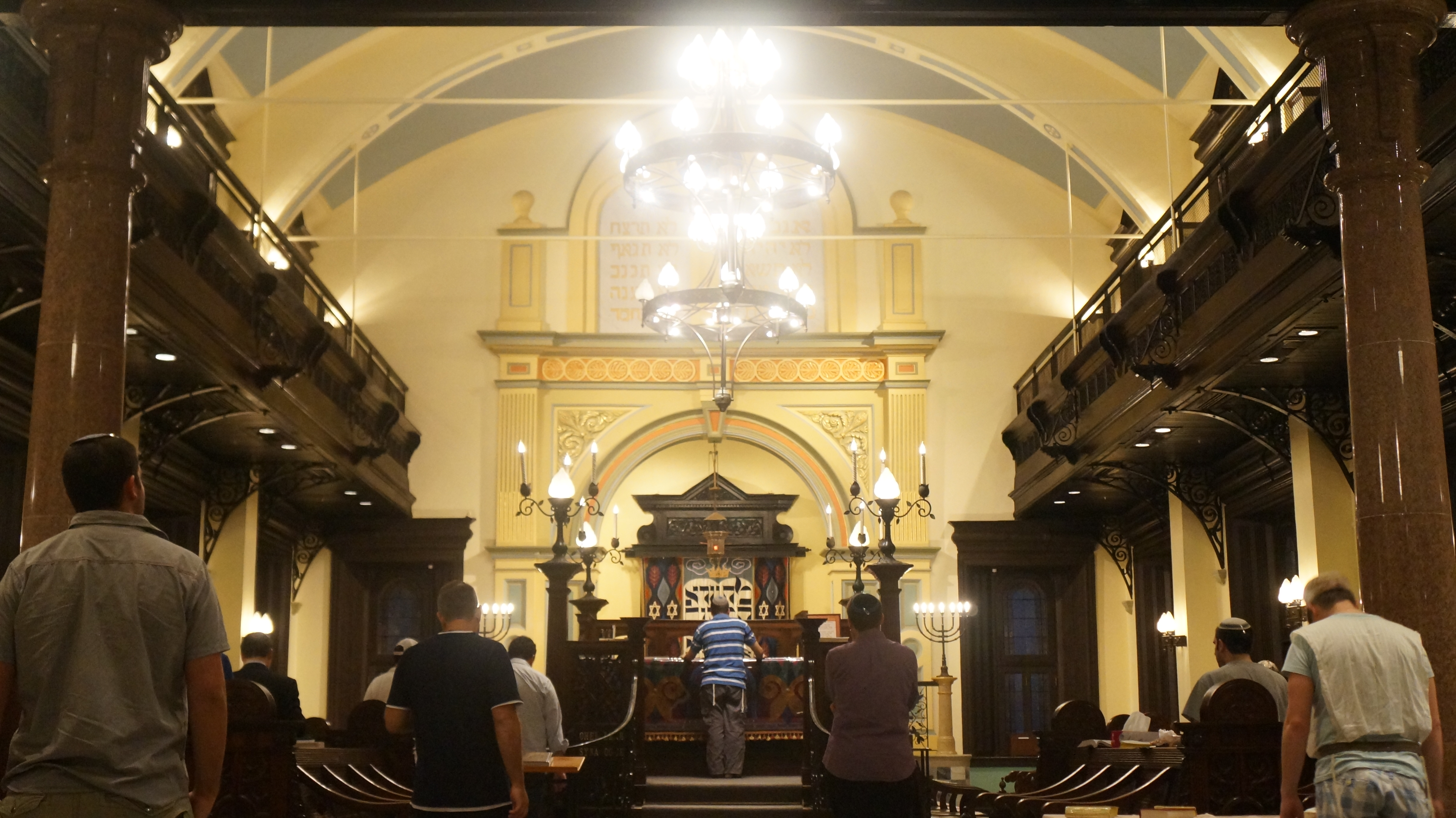 Hong Kong S Litvin 2012